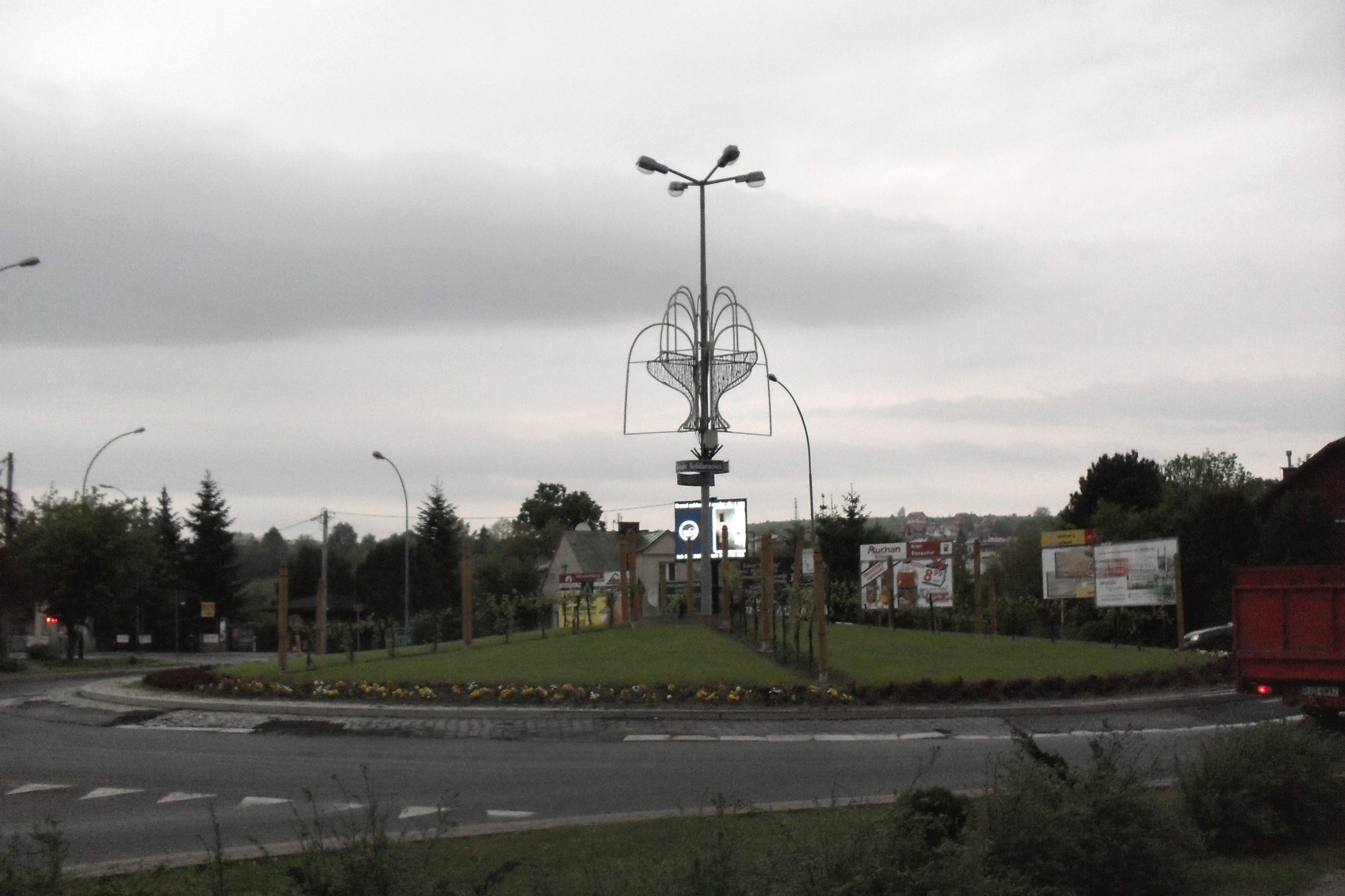 Rondo Solidarności w Jaśle. Droga krajowa nr 73.